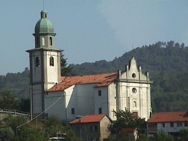 Chiesa di San Michele di Veppo, Rocchetta di Vara, Liguria, Italy